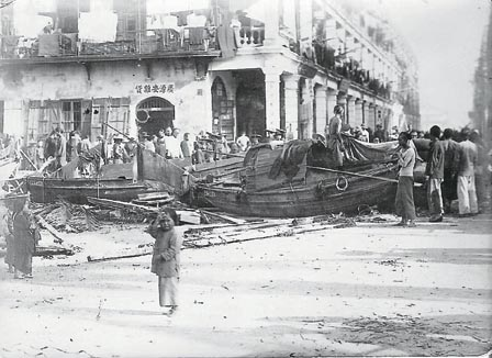 中文（香港）: 1906年9月18日香港丙午風災中，3艘舢舨被吹至油麻地街頭；明報轉載香港海事博物館。